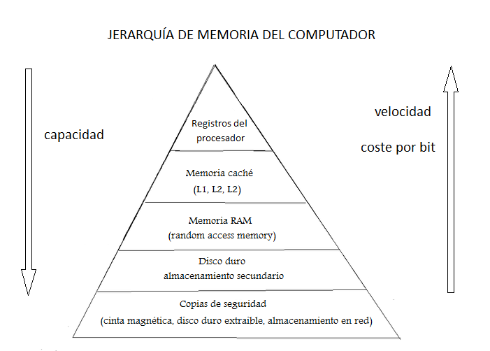 Este diagrama muestra la jerarquía de memoria de los computadores actuales.